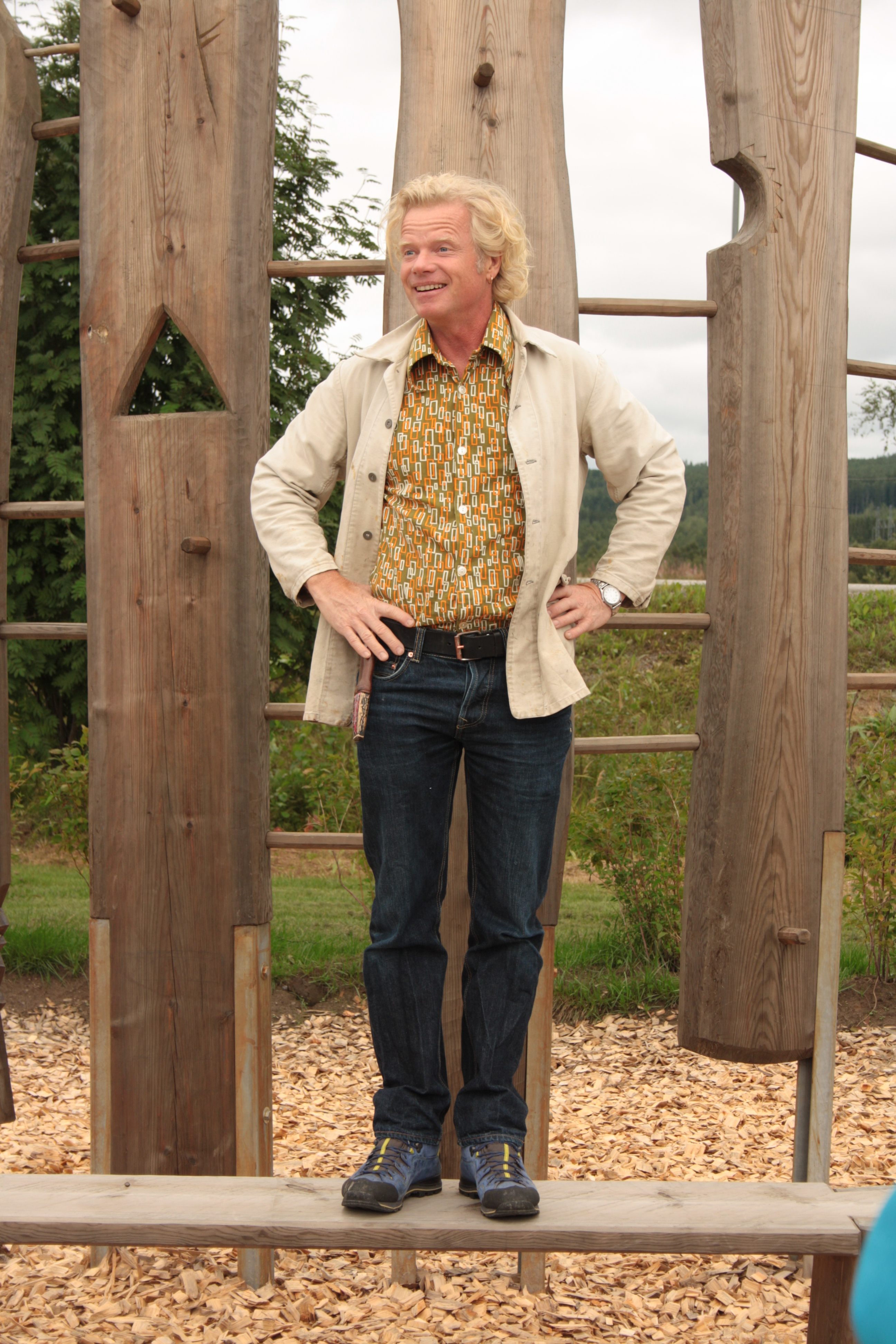 Jögge Sundqvist vid invigningen av skulpturlekplatsen vid Slöjdarnas hus, Vännäs kommun.